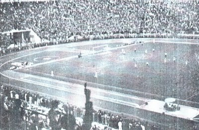 Partida disputada entre Palmeiras e Corinthians no Pacaembu em 1942